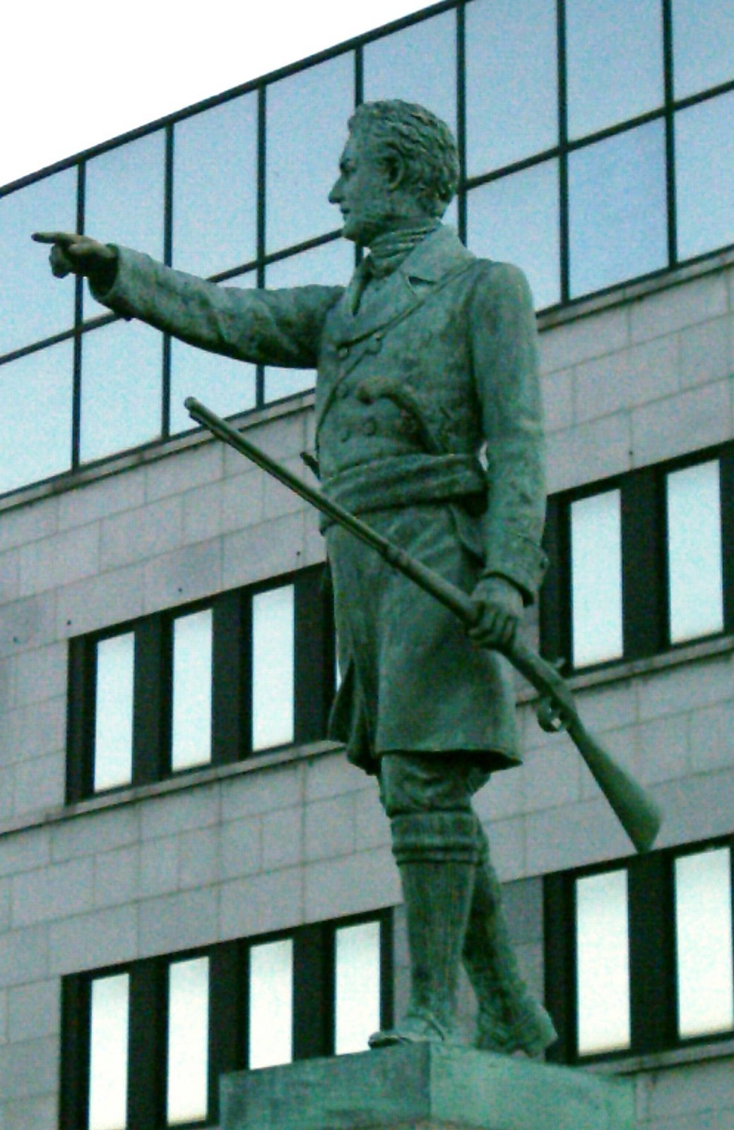 Sculpture représentant Jean-Olivier Chénier dans un parc adjacent à la rue Saint-Denis à Montréal